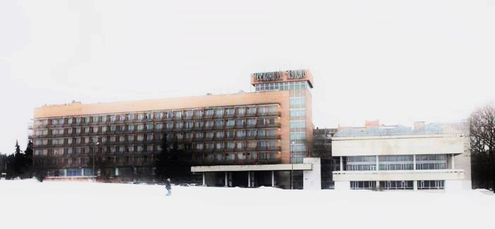 Гостиница Пущино